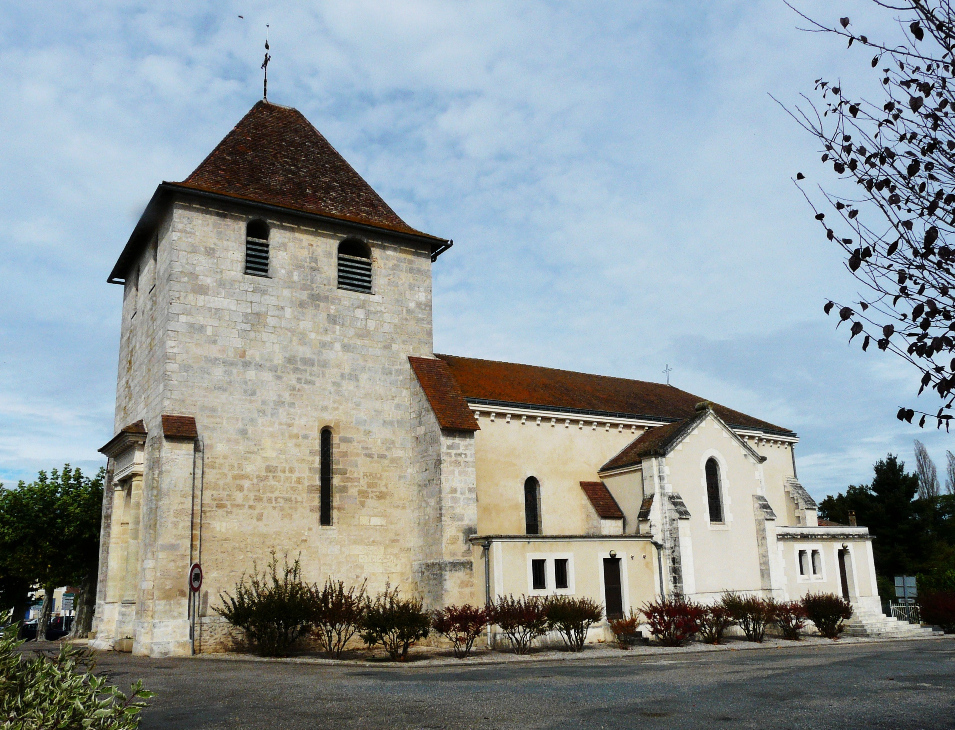 L'église Saint-Martial, Saint-Martial-d'Artenset, Dordogne, France